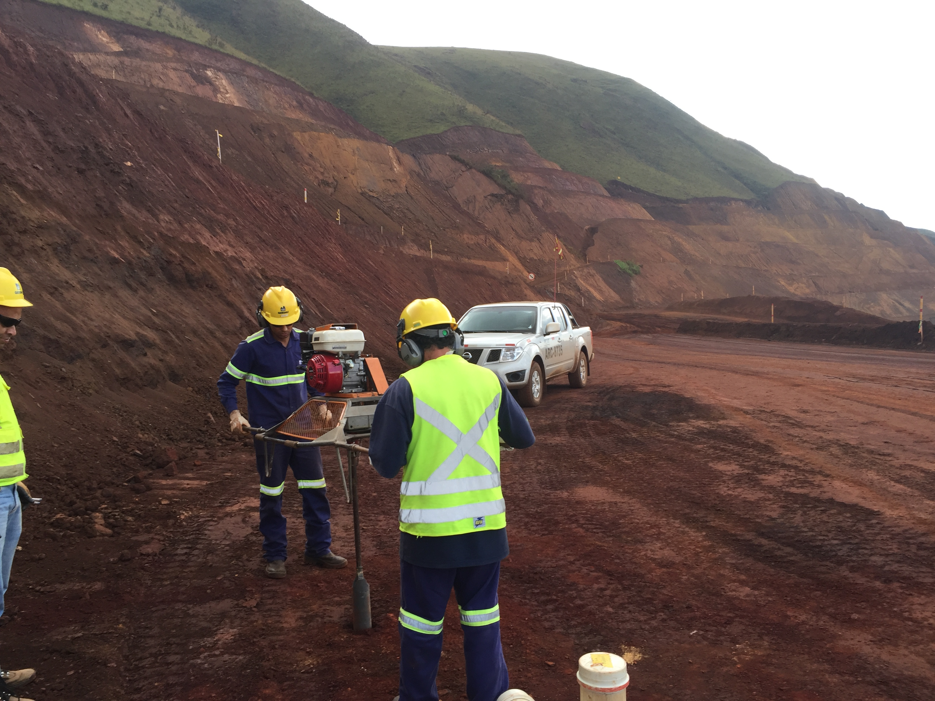 Trado na geologia de mina